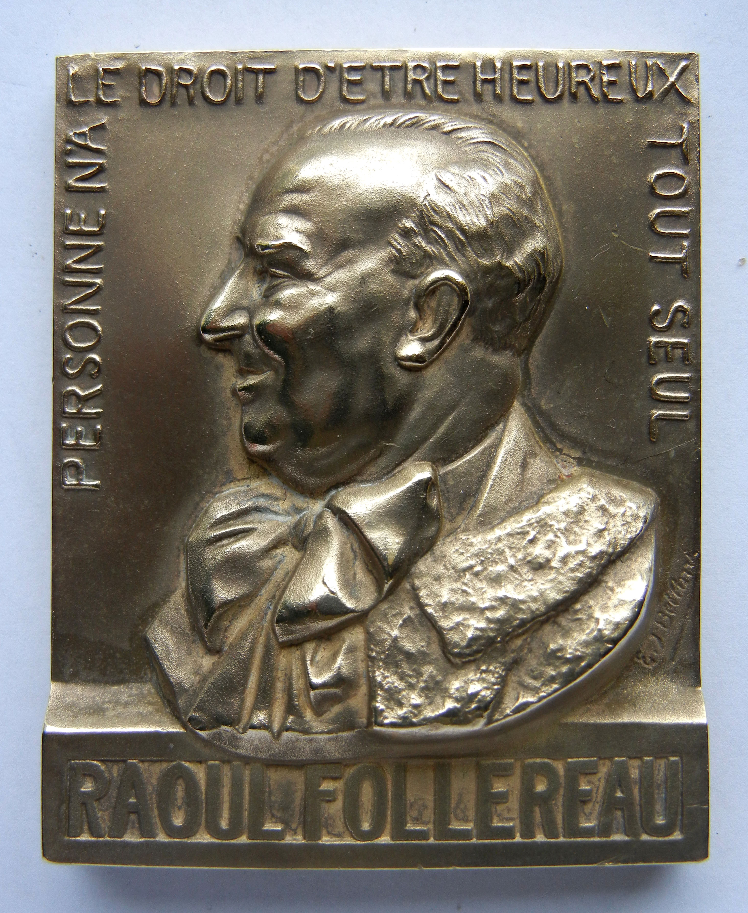 Médaille émise à l'occasion du 70e anniversaire de Raoul Follereau en 1973, graveur E. J. Belloni.Unknown medal issued to mark the 70th anniversary of raoul follereau in 1973, engraver e; j; belloni.